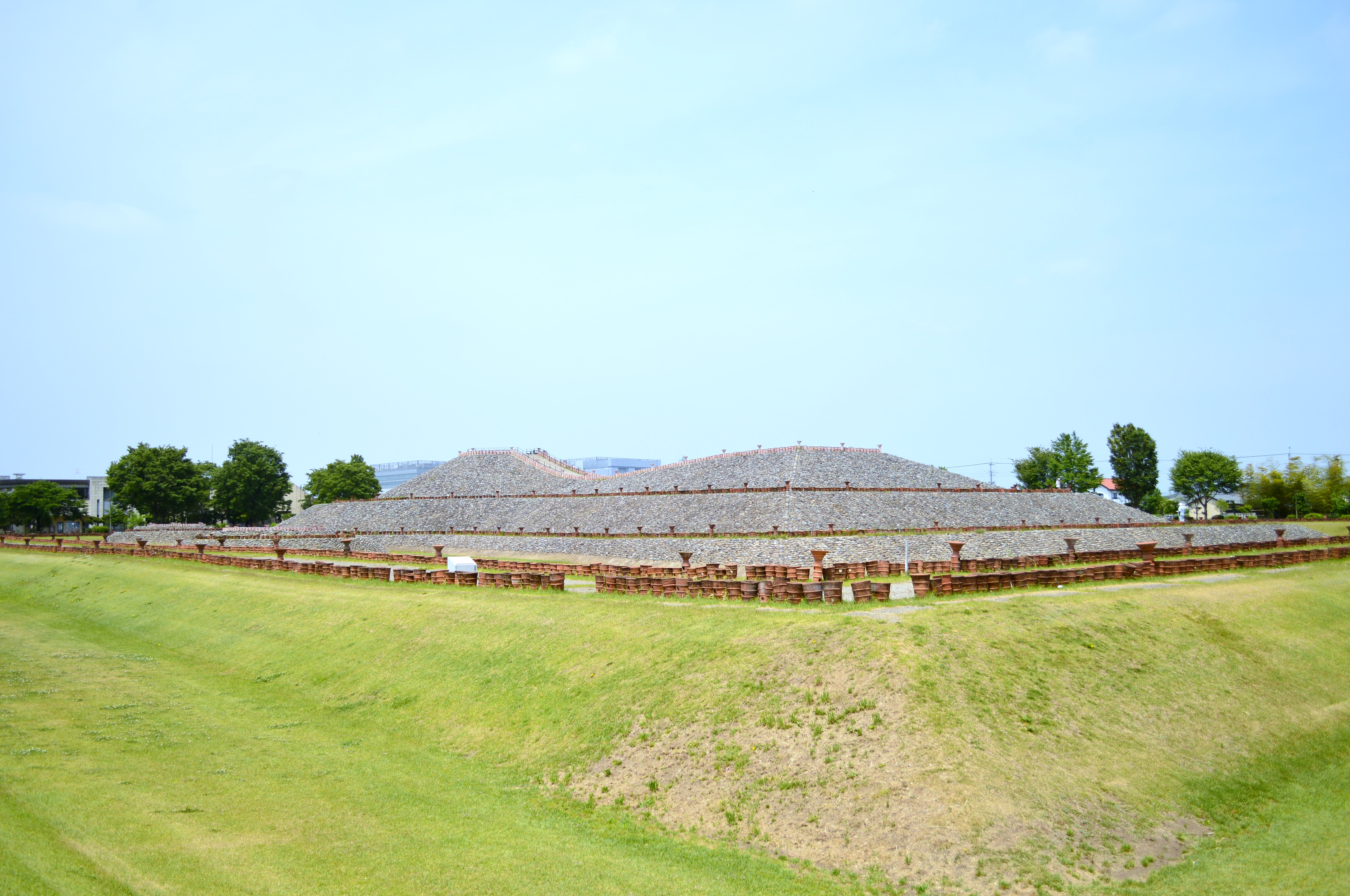 保渡田古墳群 八幡塚古墳-2